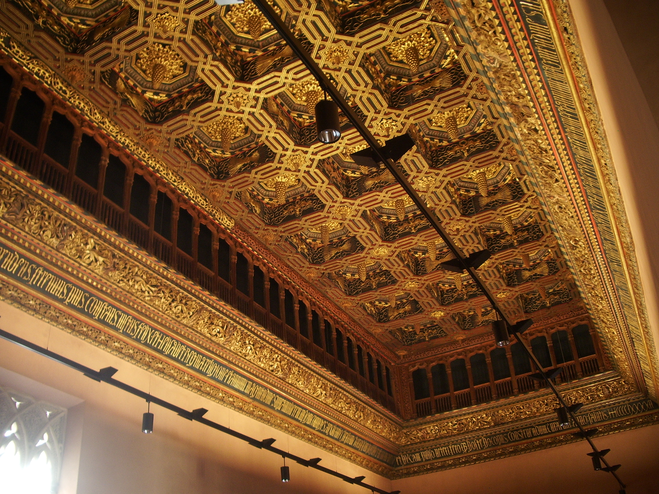 Techumbre palacio reyes catolicos aljaferia